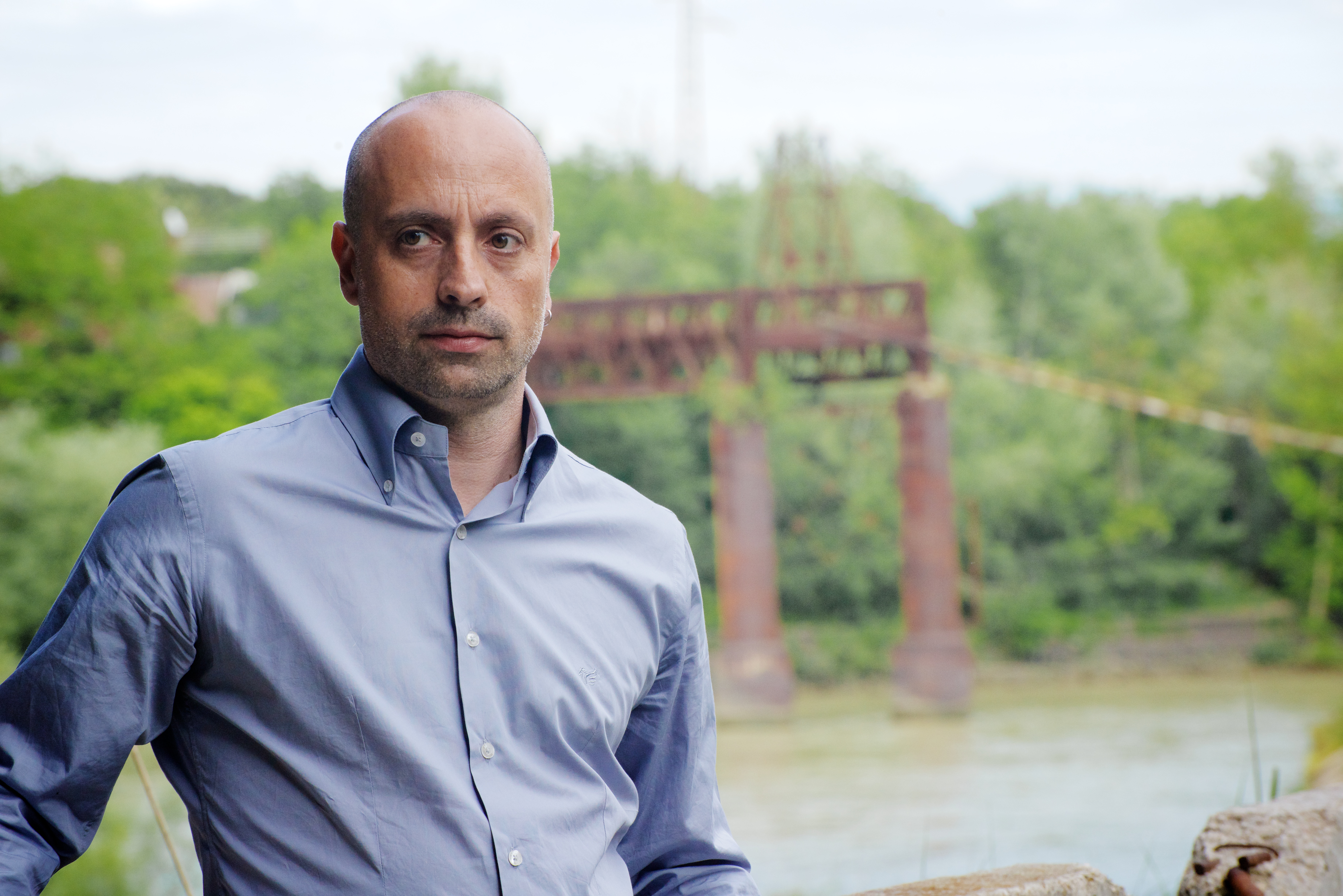 Roma